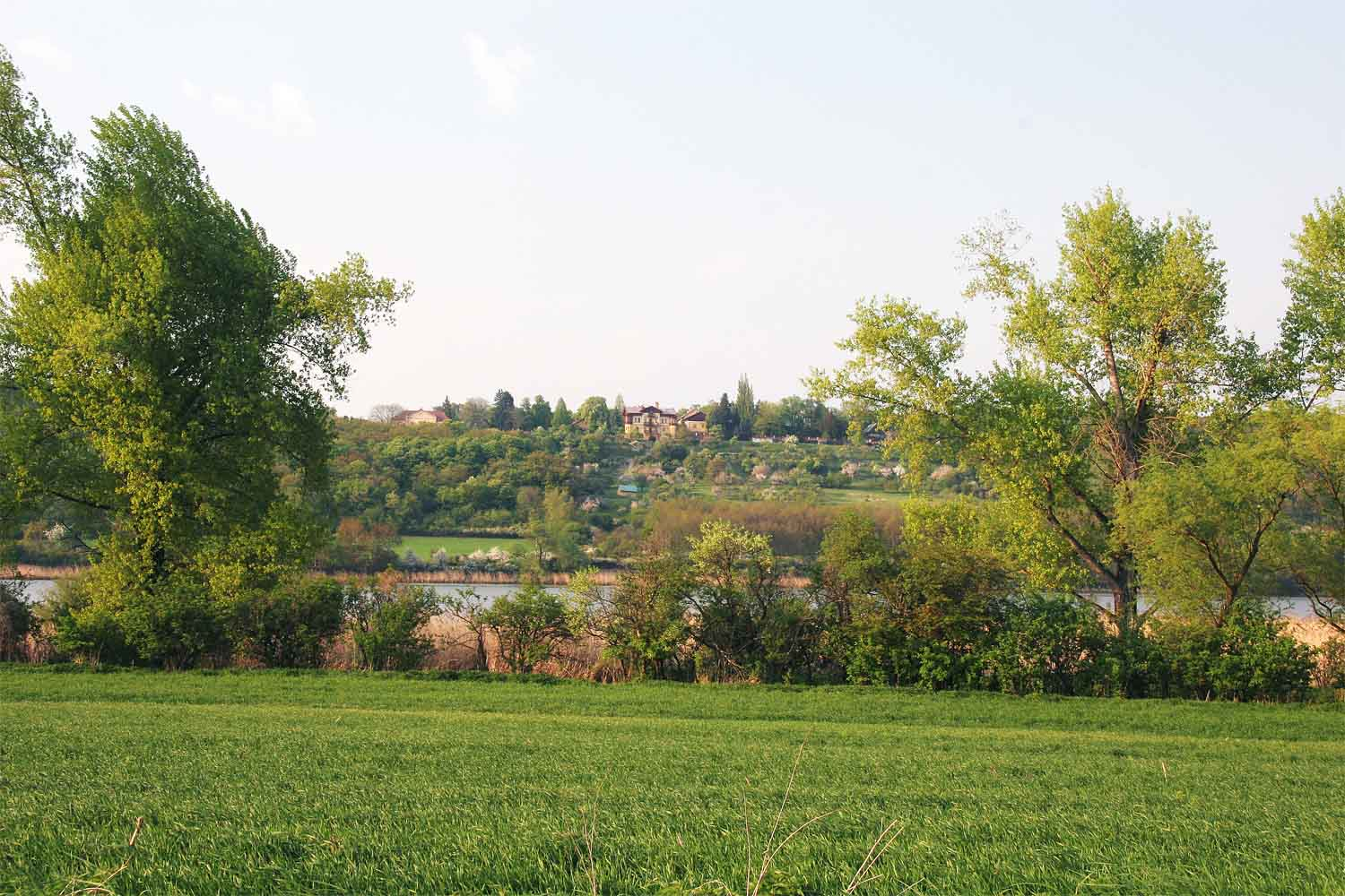 NPR Žehuňský rybník - nahoře zámeček v Oboře Žehuň